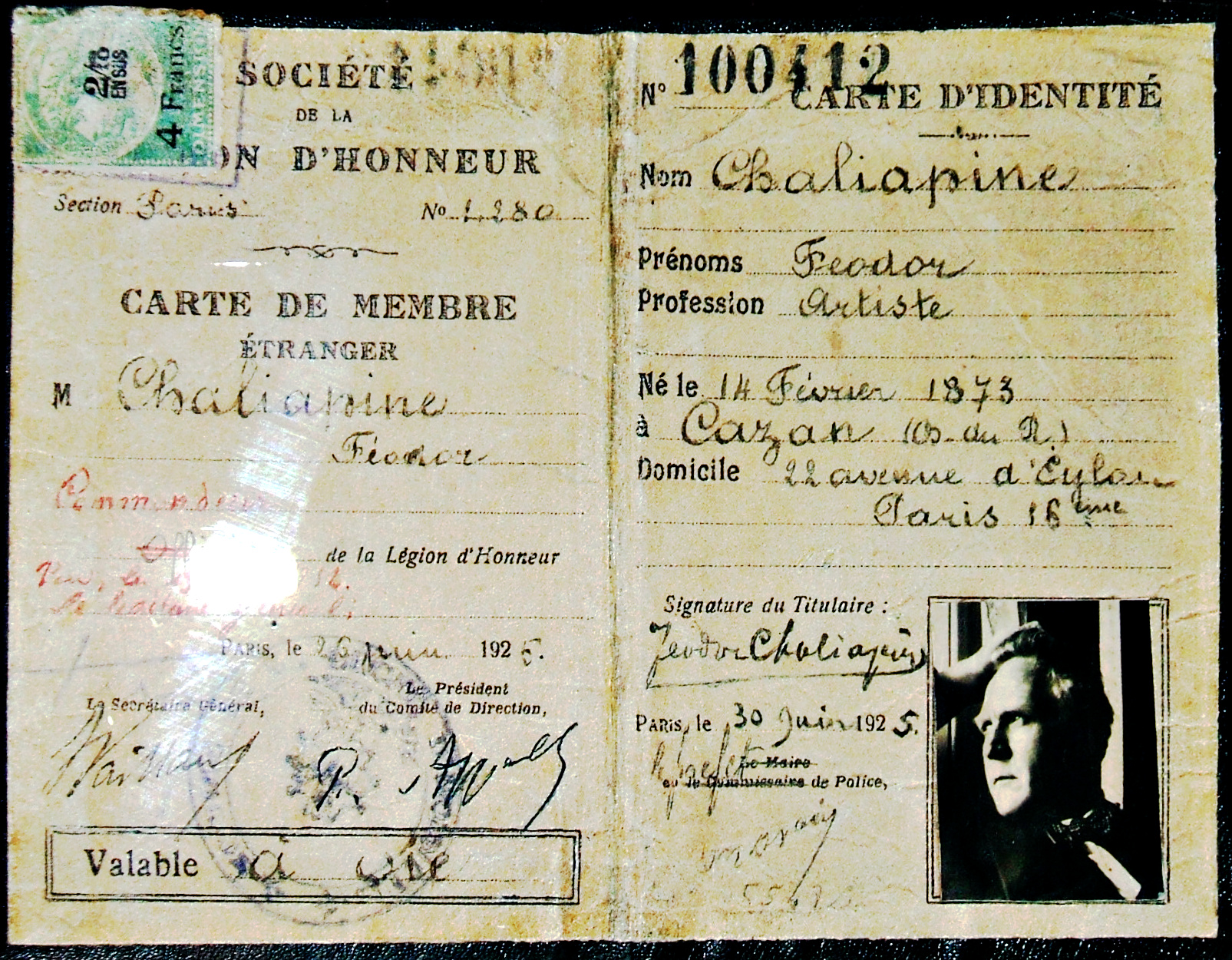 Награды Шаляпина